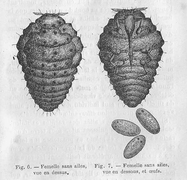 Femelle aptère de Phylloxéra